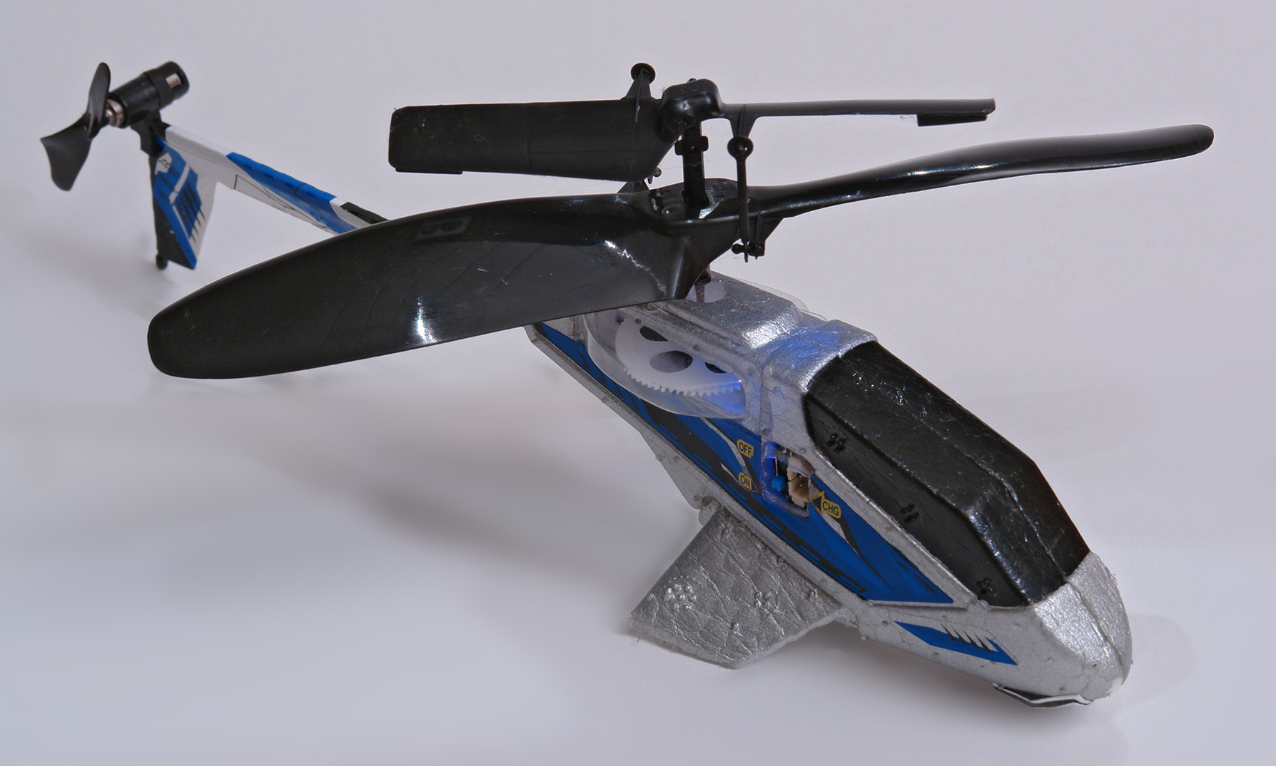 Picoo Z Helicopter